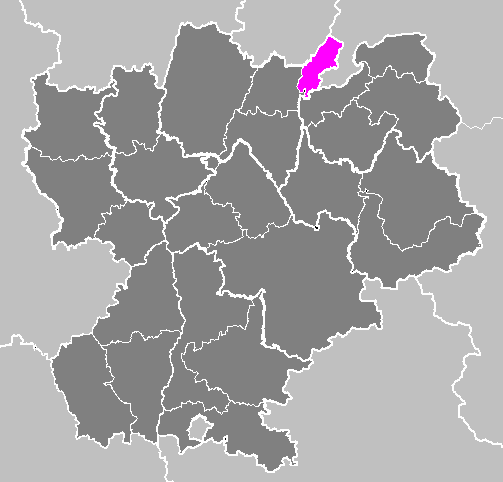 Maps of arrondissements and cantons of France: Arrondissement de Gex.PNG (Région Rhône-Alpes)